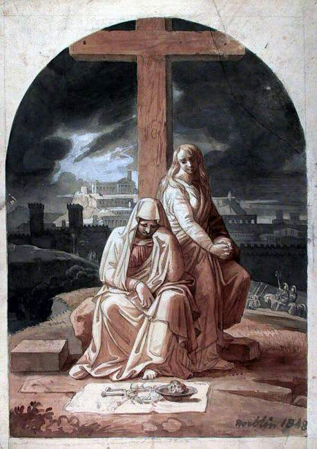 La Vierge au pied de la Croix